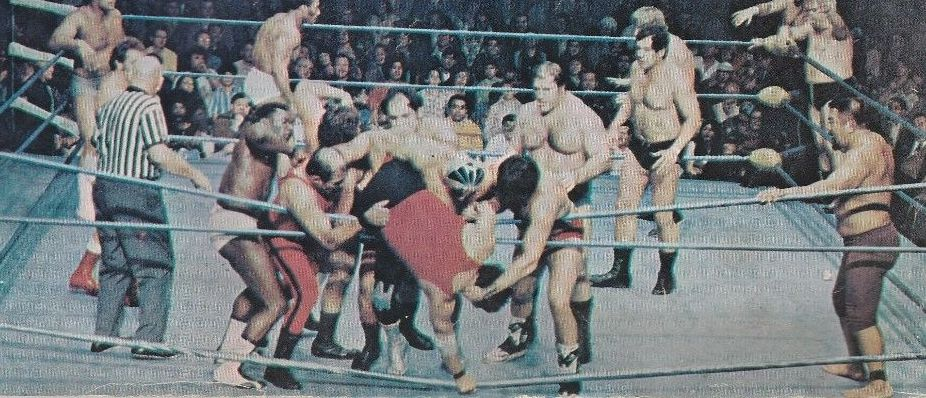 Pedro Morales en couverture du magazine de catch Wrestling Annual n.4 de 1973.